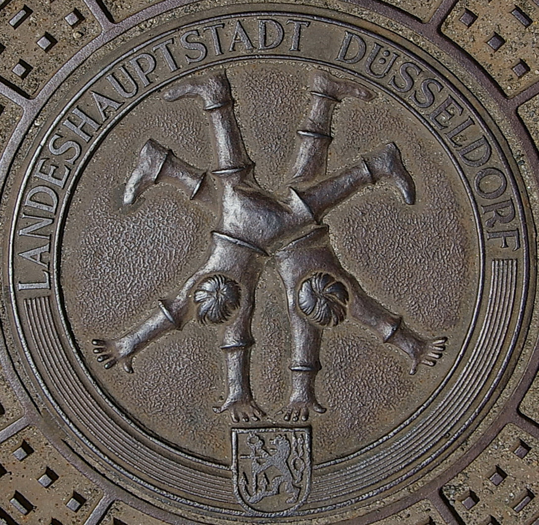 Kanaldeckel in Düsseldorf mit Radschläger-Relief am Stadthafen/Düssel-Mündung